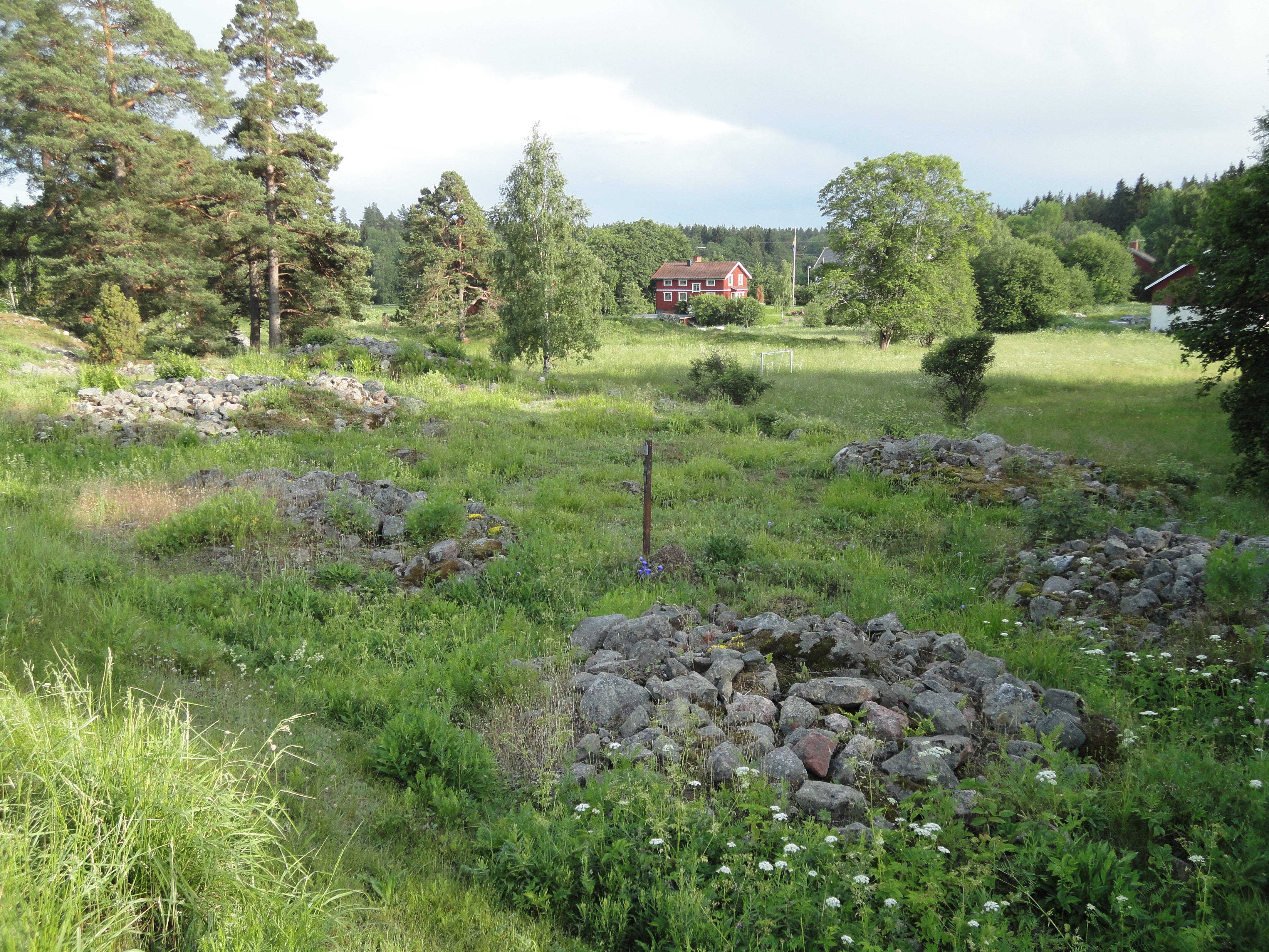 Järvsta gravfält, Gälvle kommun.